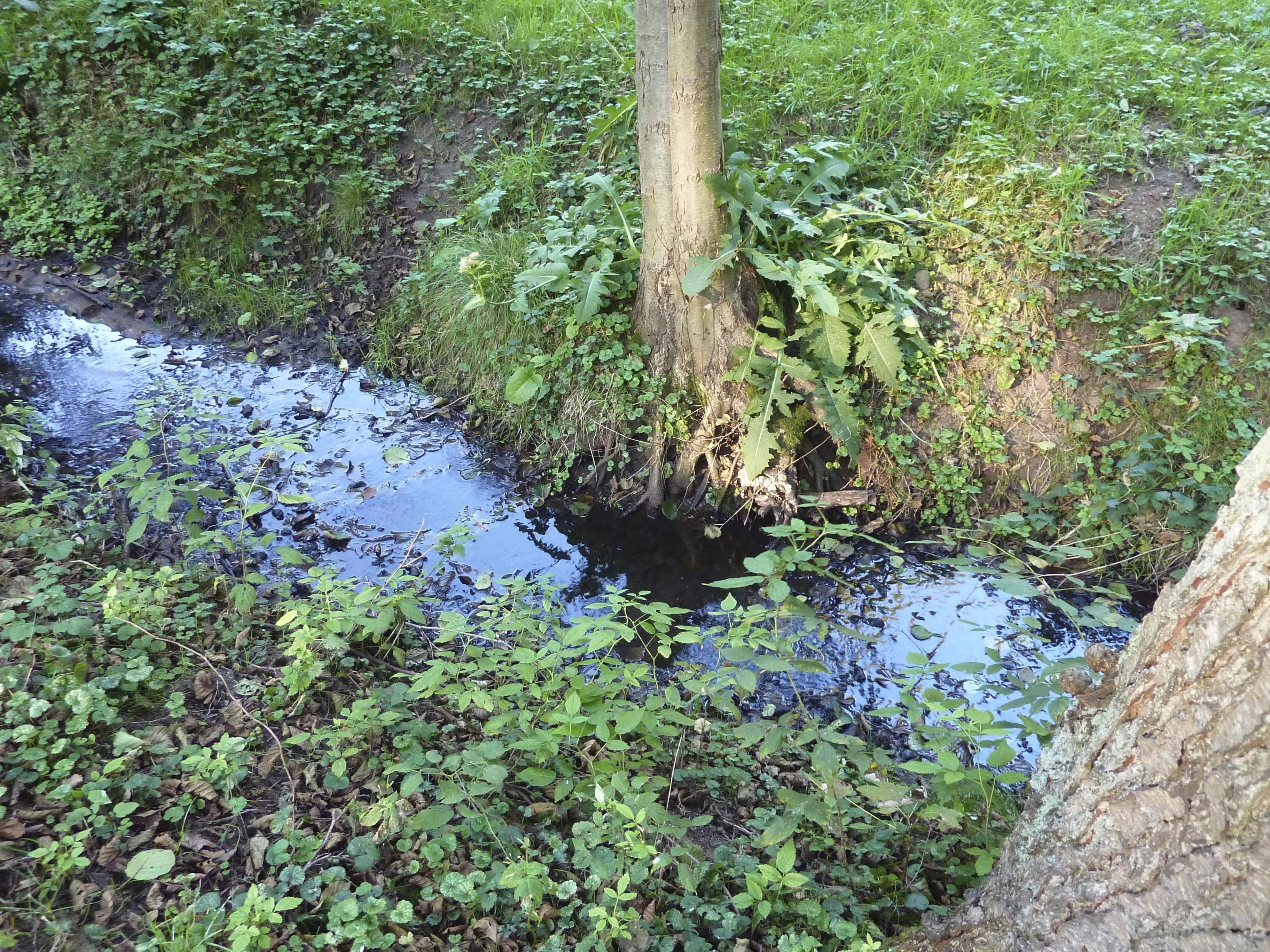 Der Königsbach, im Volksmund auch Luderbach genannt, ist ein 13,7 km langer linker (südlicher) Zufluss des Flusses Main im deutschen Bundesland Hessen. Der Bach entspringt östlich der Stadt Dreieich im Landkreis Offenbach, durchfließt das Stadtgebiet von Neu-Isenburg sowie den Frankfurter Stadtwald und den dort befindlichen Jacobiweiher. Der Königsbach mündet verrohrt im Stadtteil Niederrad der Stadt Frankfurt am Main. An der abgebildeten Königswiese ist der Bachlauf für eine kurze Strecke in zwei Arme geteilt. Das Foto zeigt den Austritt des westlichen Arms unter einer Brücke der Stoltzeschneise. In der oberen Bildmitte der Stamm einer der für den Unterlauf des Baches typischen Schwarzerlen (Alnus glutinosa) mit dem für die Art charakteristischen feuchtständigen Wurzelwerk.